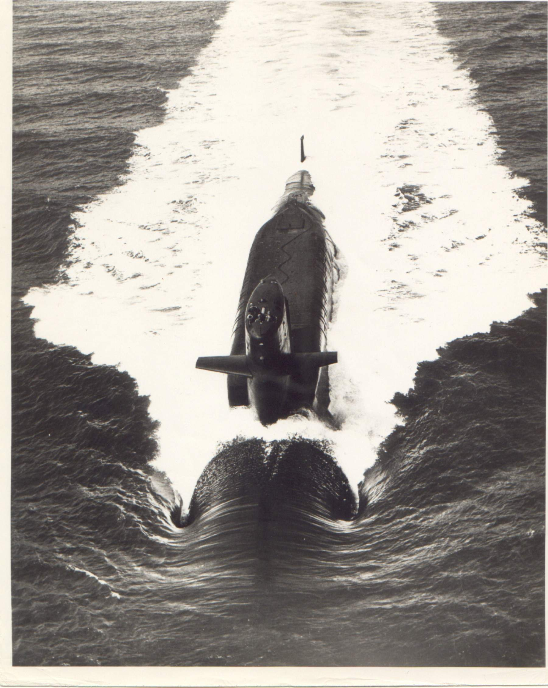 USS Robert E. Lee (SSBN-601)